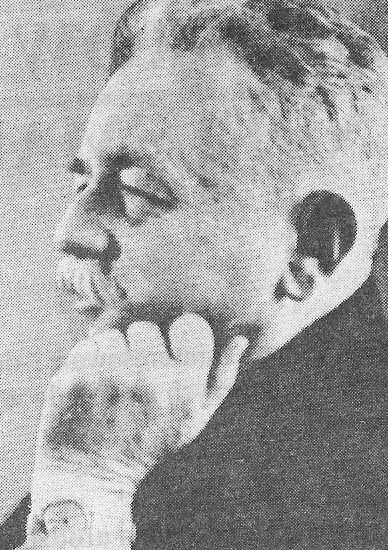 Marceli Handelsman.